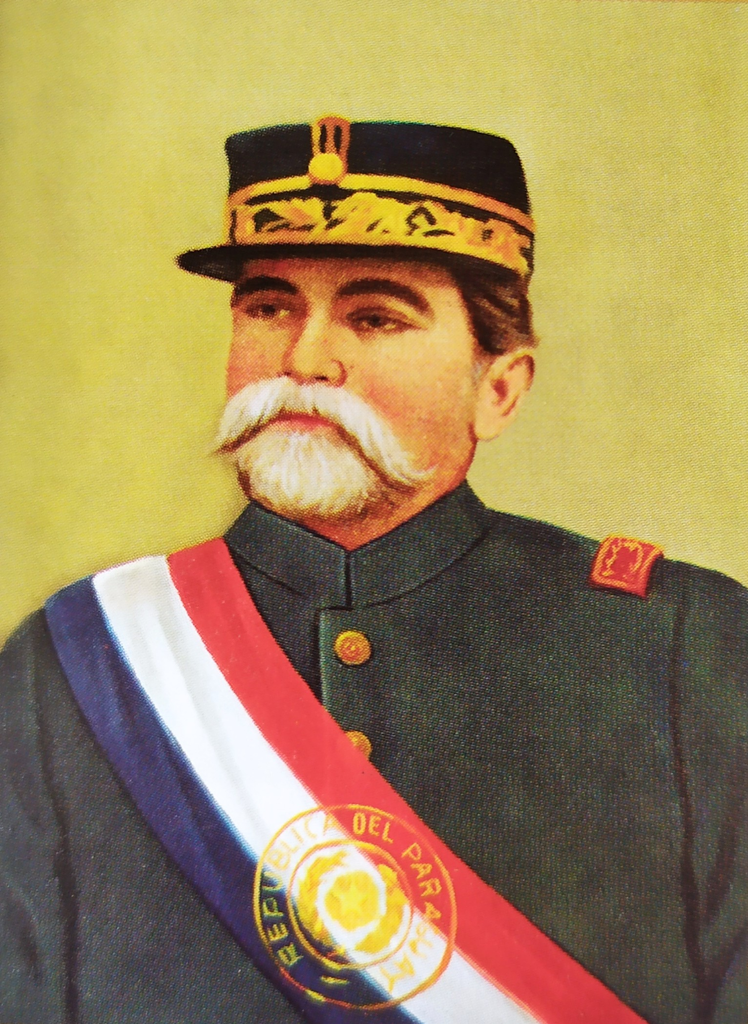 Juan Bautista Luis Egusquiza Isasi